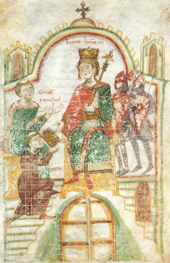 Der Dichter, begleitet vom Kanzler Konrad von Querfurt, überreicht dem Kaiser Heinrich VI. das Werk. Widmungsbild im Liber ad honorem Augusti des Petrus von Eboli, Bern, Burgerbibliothek, Codex 120. II, fol. 139r.